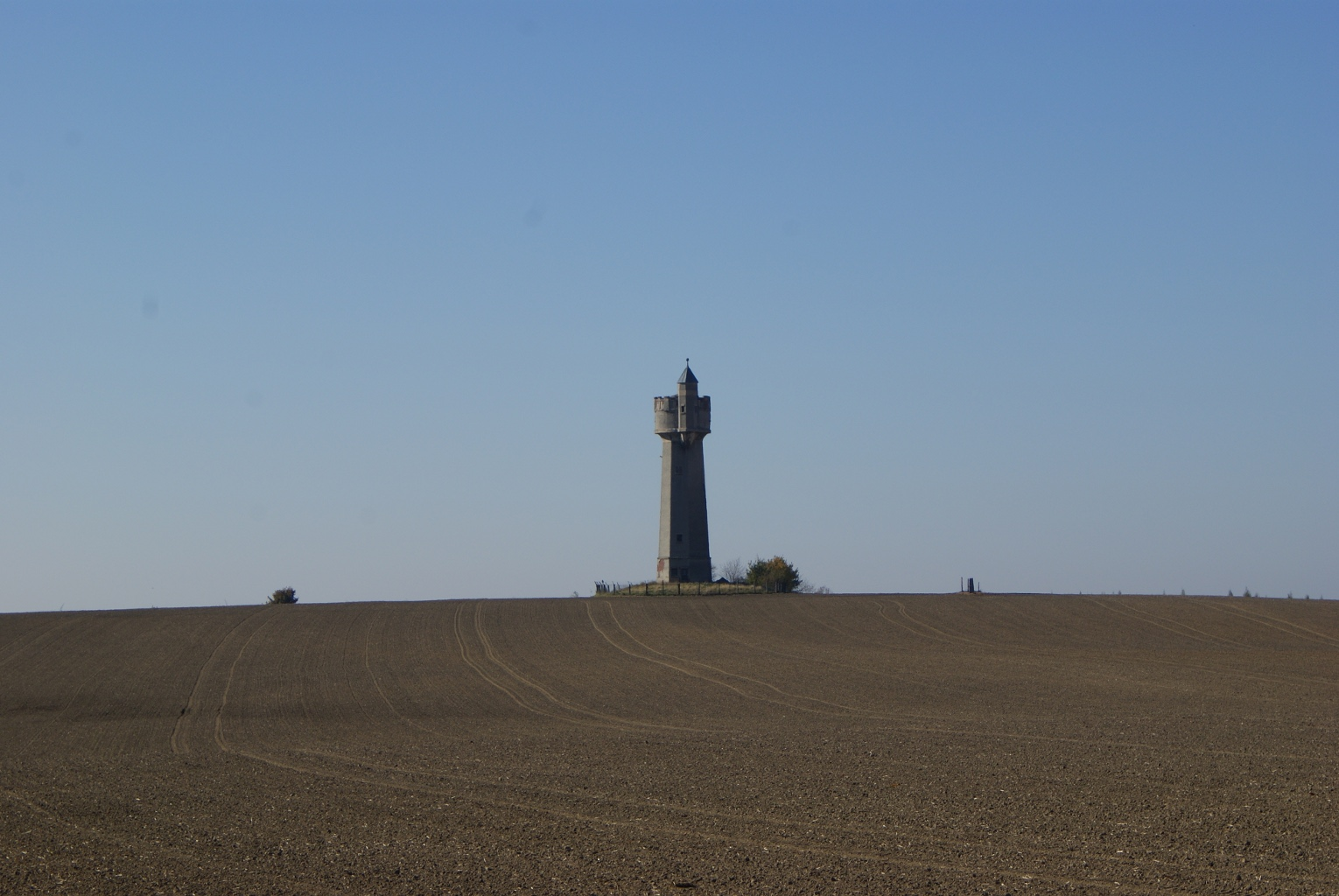 Wasserturm Bräunsdorf auf dem Wäschberg